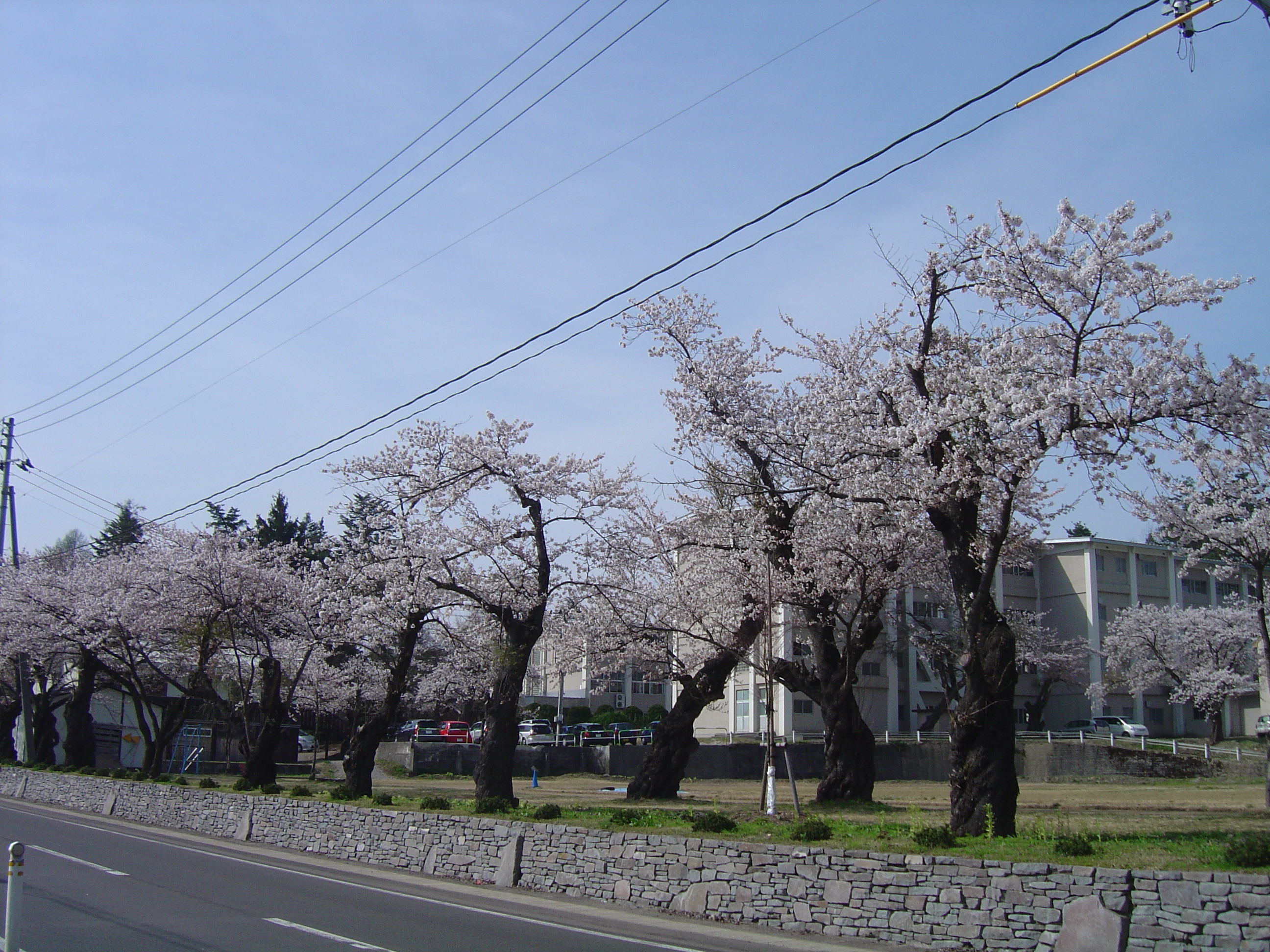 桜の中に校舎があります。